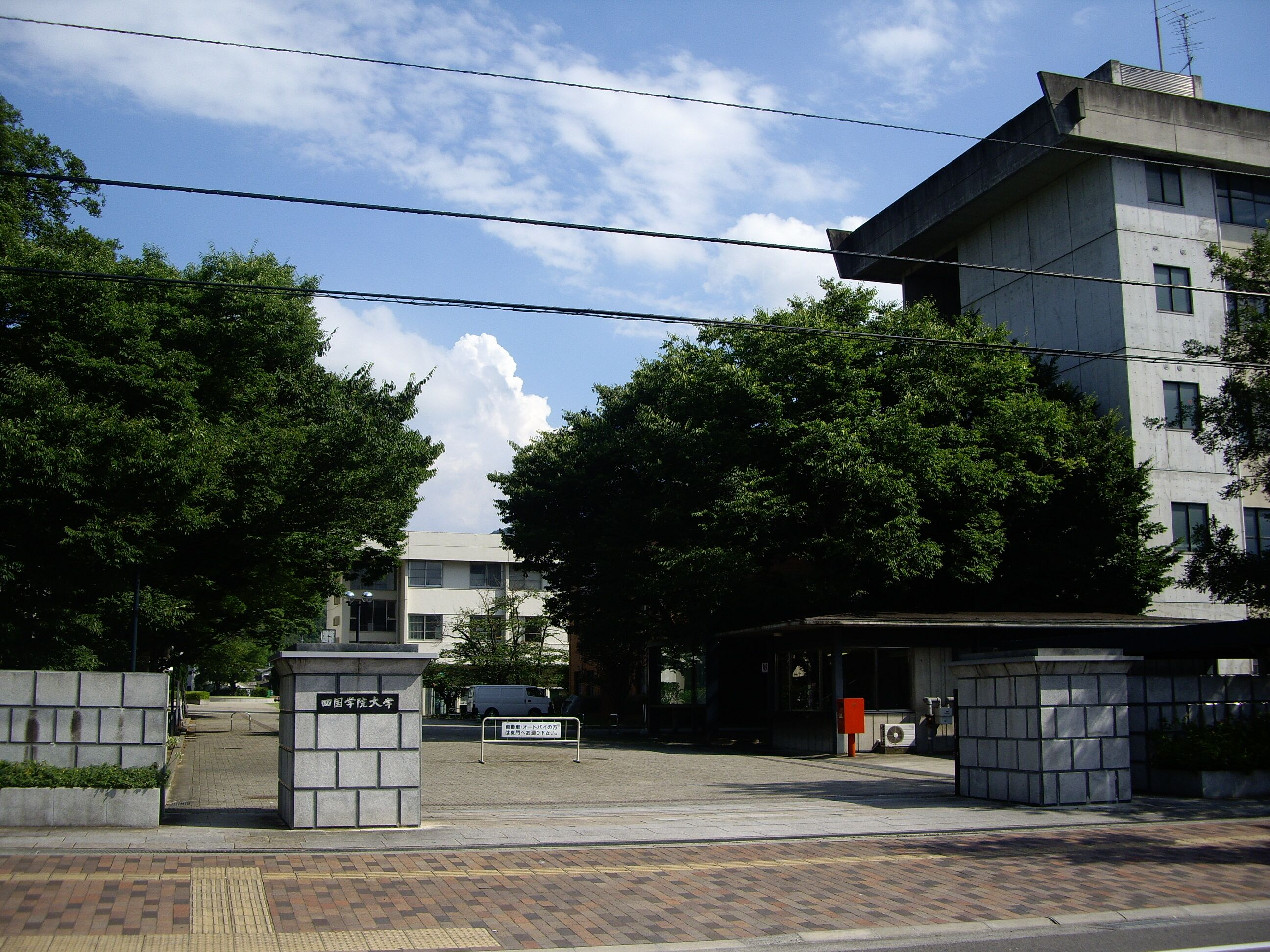 四国学院大学（正面門）